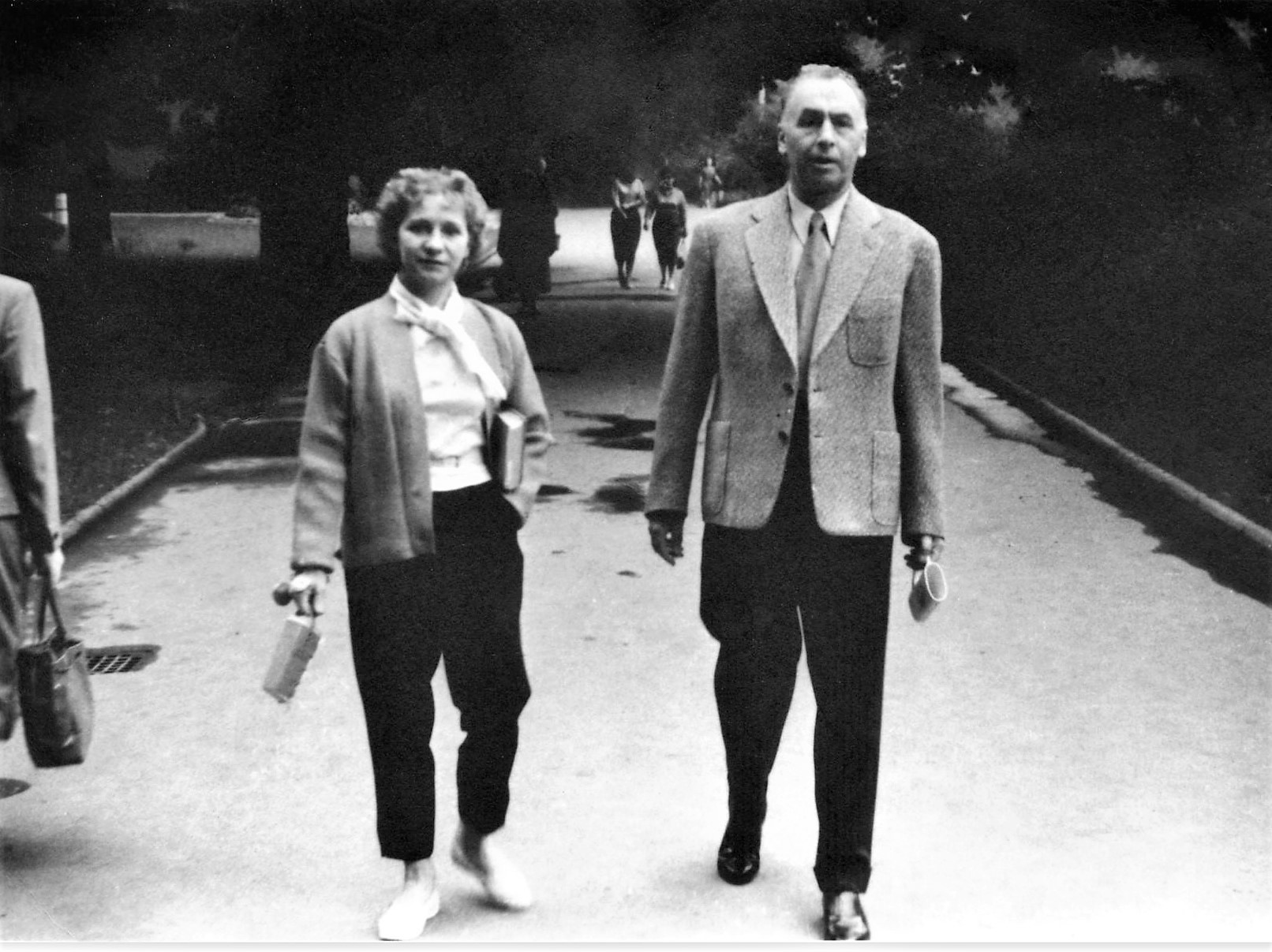 Алексей Иннокентьевич Алексеев и его супруга Ольга Васильевна Лепешинская на отдыхе в Карловых Варах (Чехословакия)